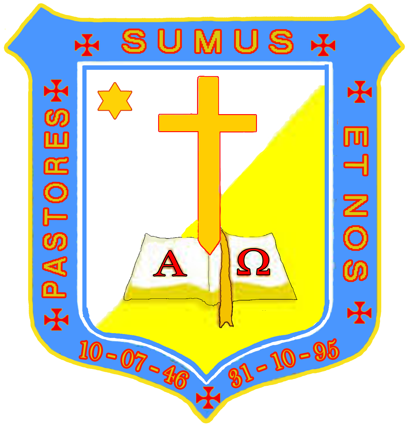 Escudo del Ordinariato Militar de Venezuela